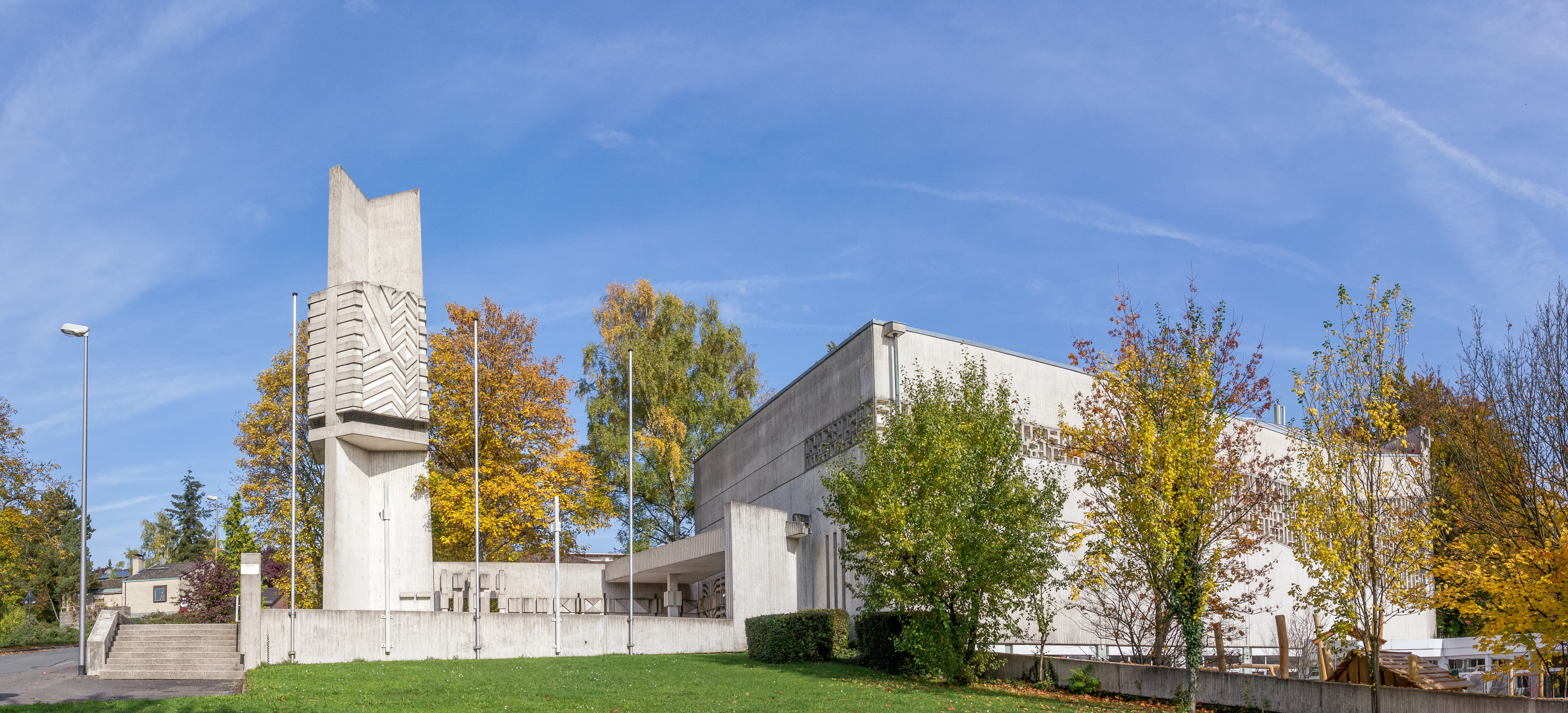 Panoramaaufnahme der Wiesbadener St. Mauritiuskirche